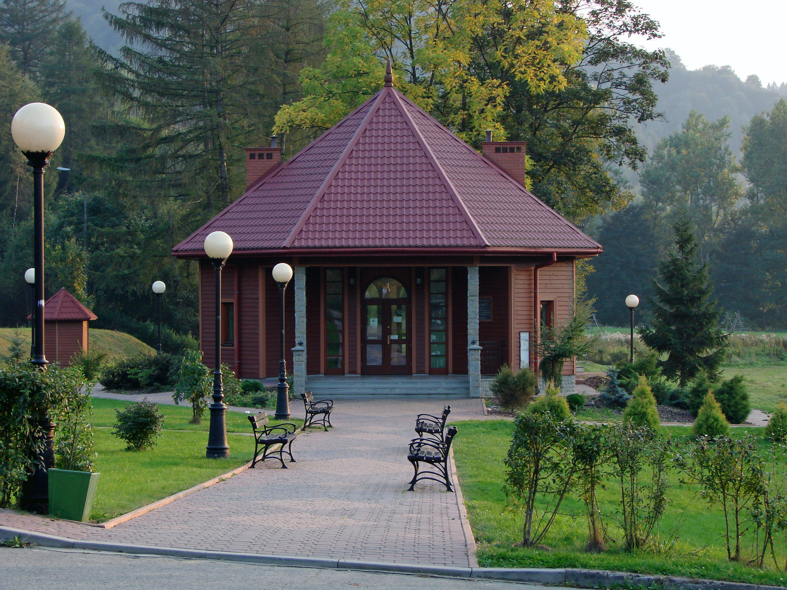 Pijalnia Antoni, Muszyna